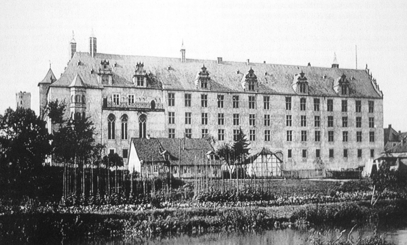 Welfenschloss Münden mit Werra und Blümer Werder